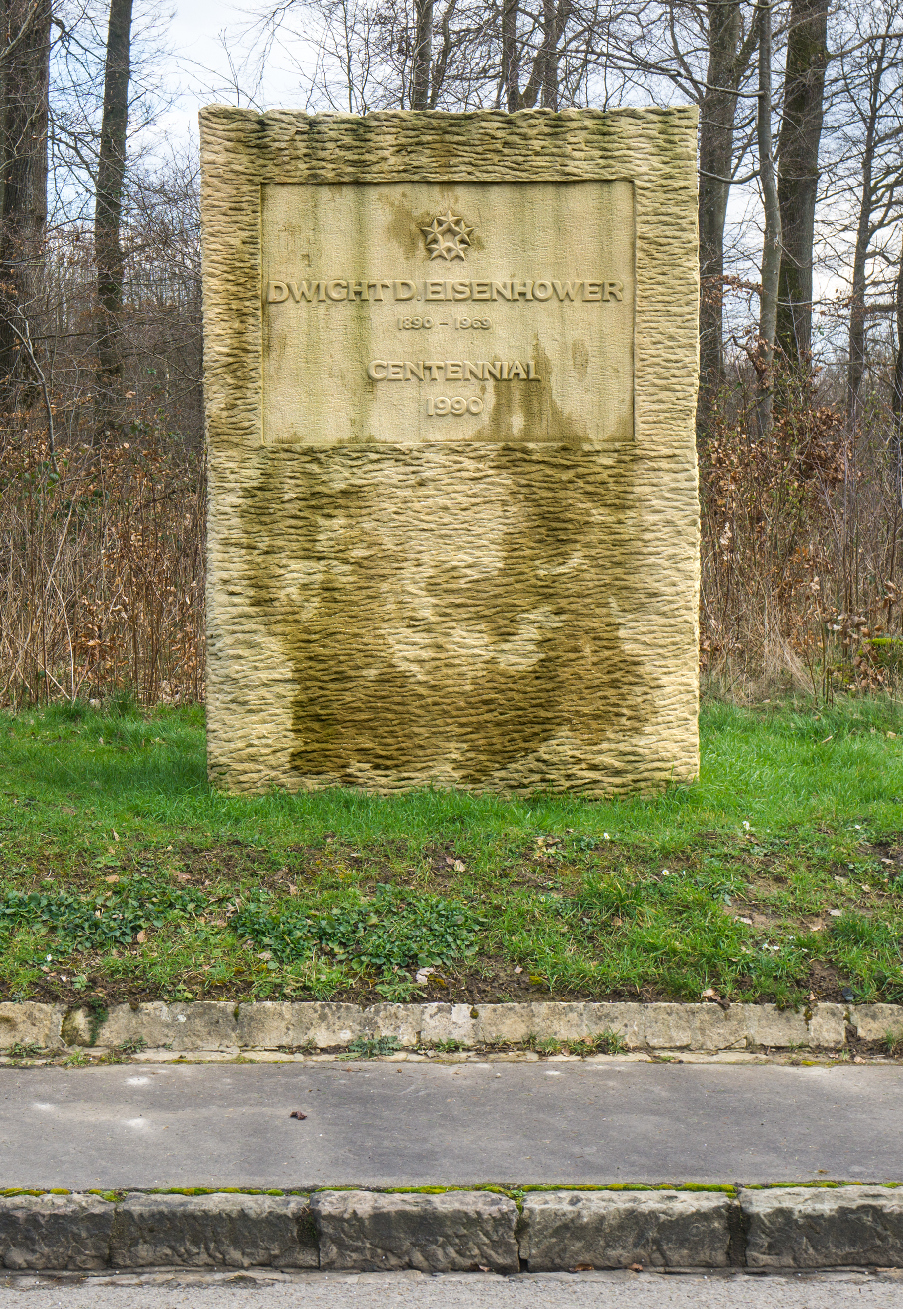 Monument zum 100. Gebuertsdag vum Dwight D. Eisenhower zu Hamm, net wäit vum amerikanesche Militärkierfecht